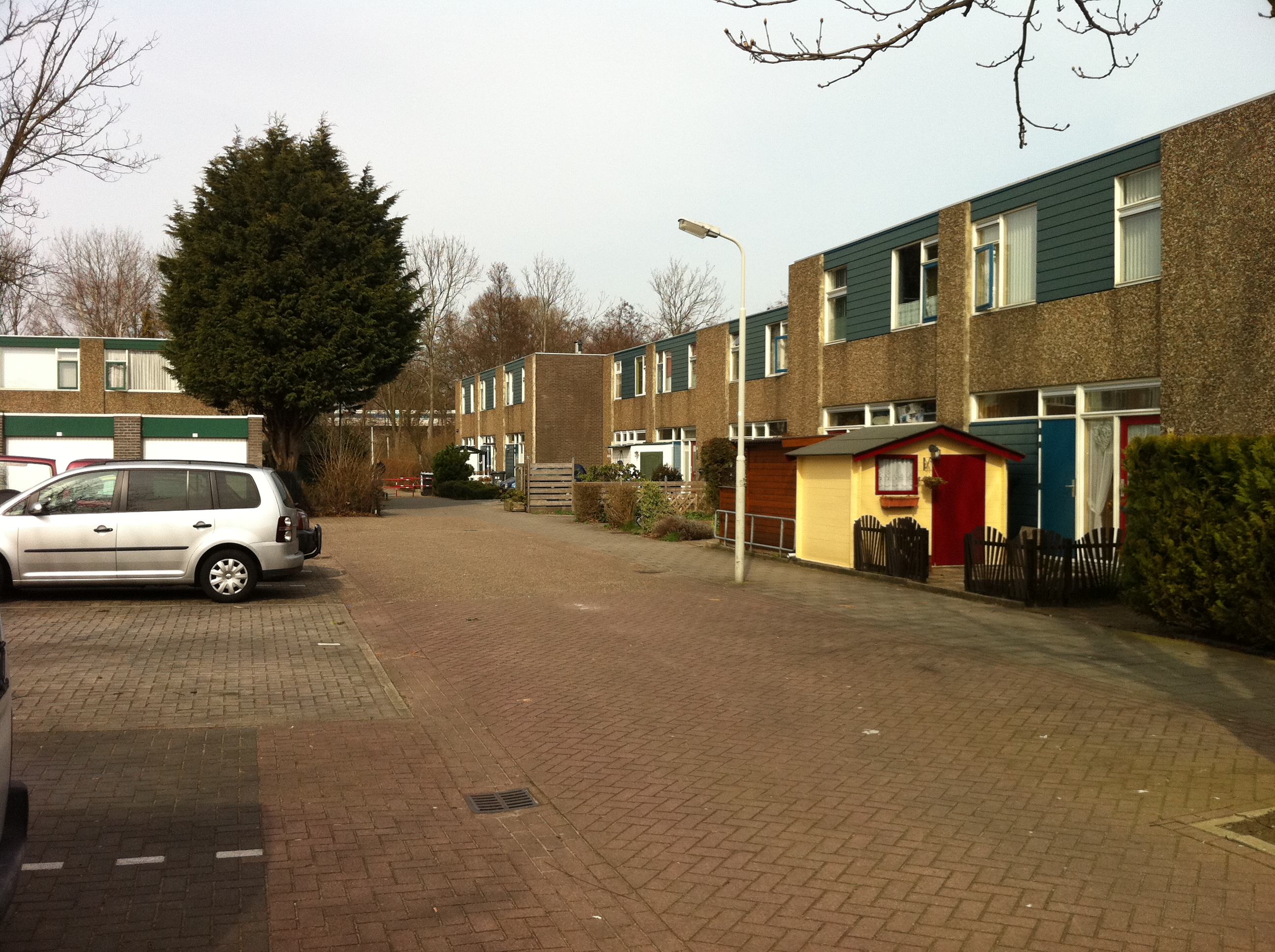 Koog aan de Zaan - Boukeveld, wijk Westerkoog. Sociale woningbouw van Parteon, deels verkocht aan particulieren